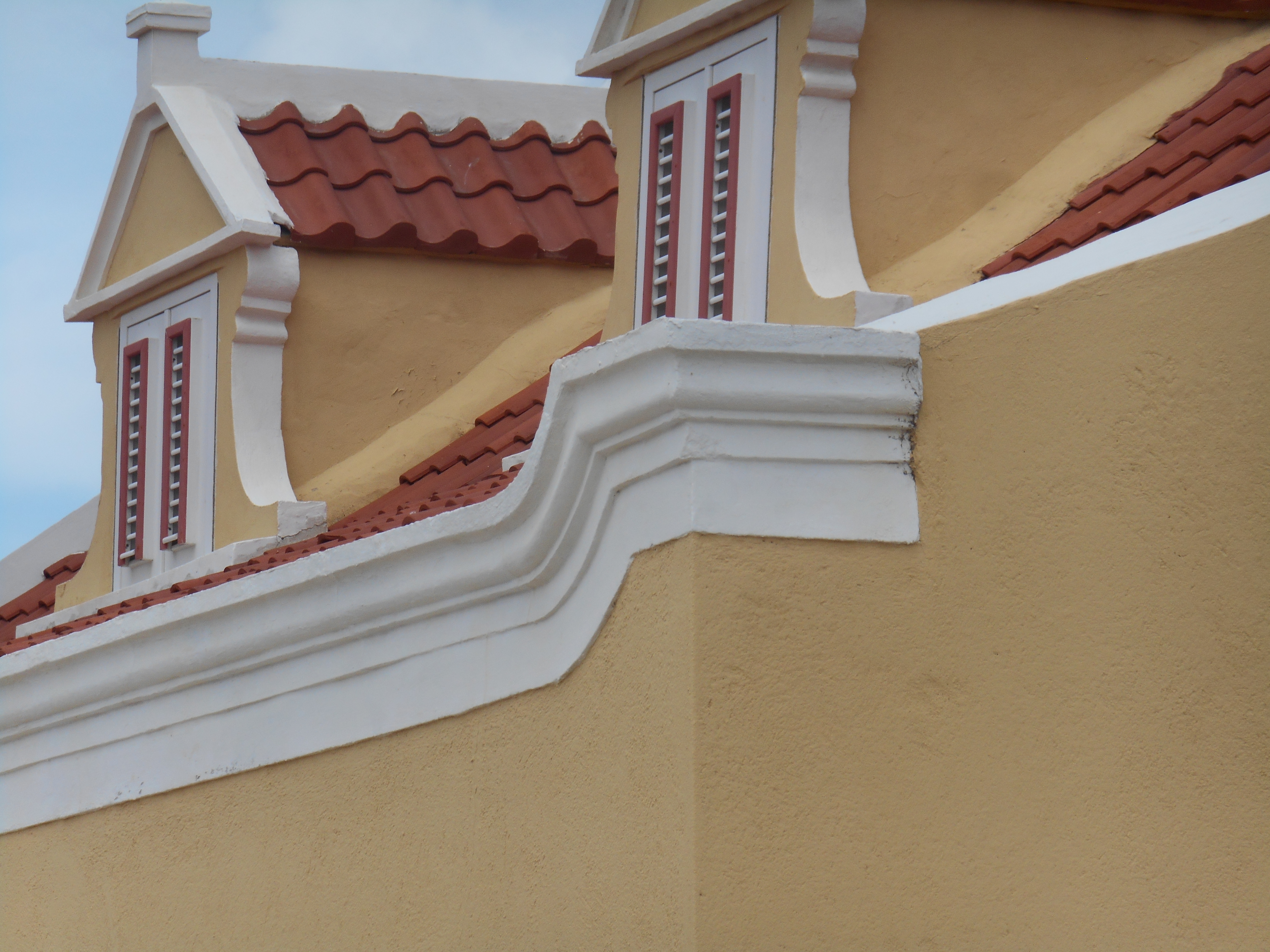 Close-up van de dakkappellen